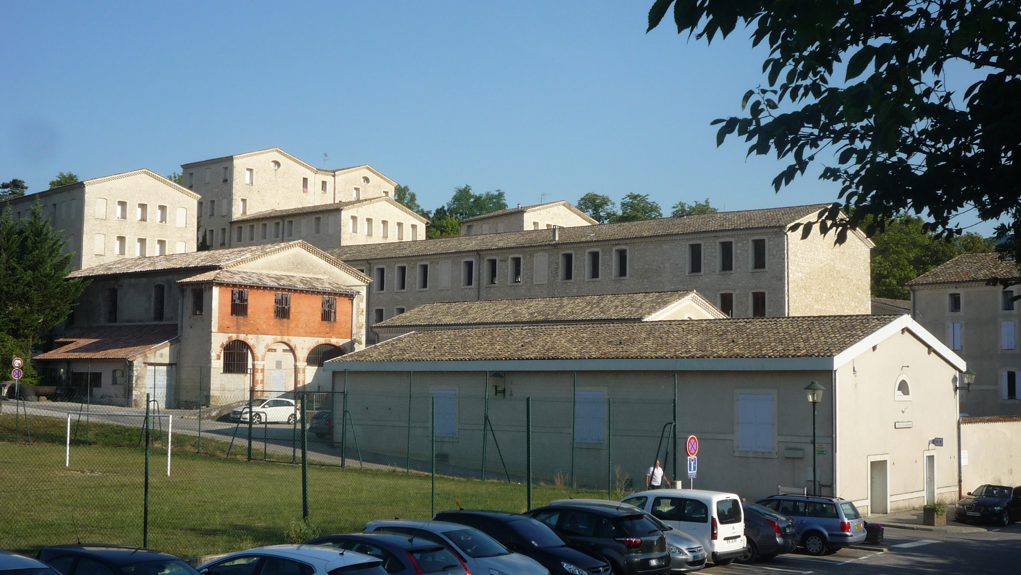 Vue sur les Logement Sociaux de Blacons, avec la Mairie au centre, et la salle communale au premier plan.